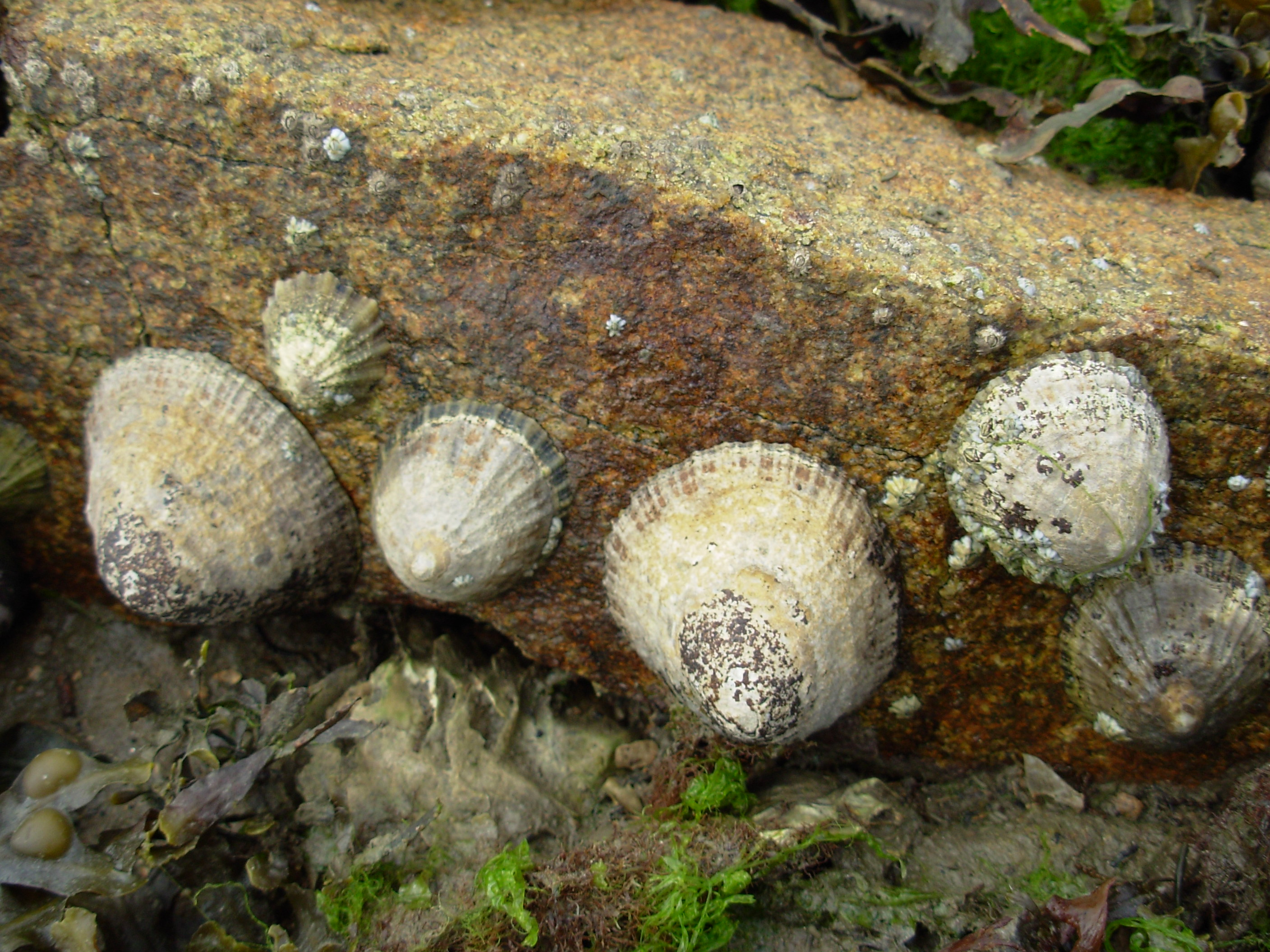 Groupe de patelles sur un bloc.